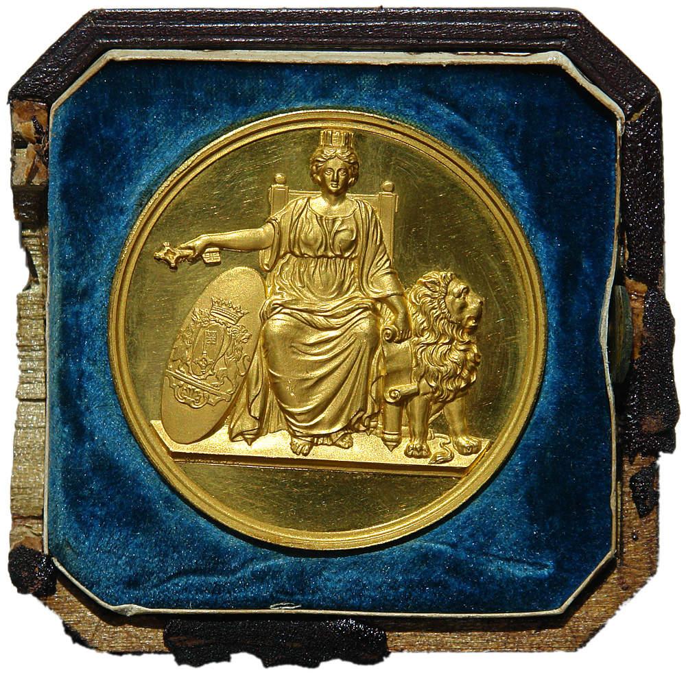 Focke-Museum Bremen: Bremische Ehrenmedaille in Gold von 1846 (im Schatullen-Fragment). Verliehen an den Geldmakler Johann Martin Wolde für Verdienste um die Wunstorf–Bremer Eisenbahn Focke-Museum Native nameFocke-MuseumLocationBremen, GermanyCoordinates53° 5′ 33.00″ N, 8° 51′ 51.00″ E Established1918/1959Website